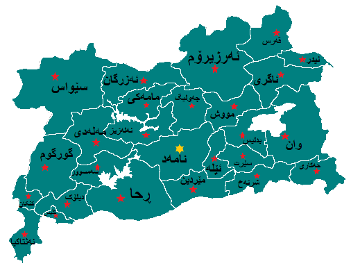 کوردی: باکوور